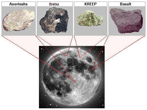 Tipus comuns de roques predominants a l'escorça de la Lluna segons la regió